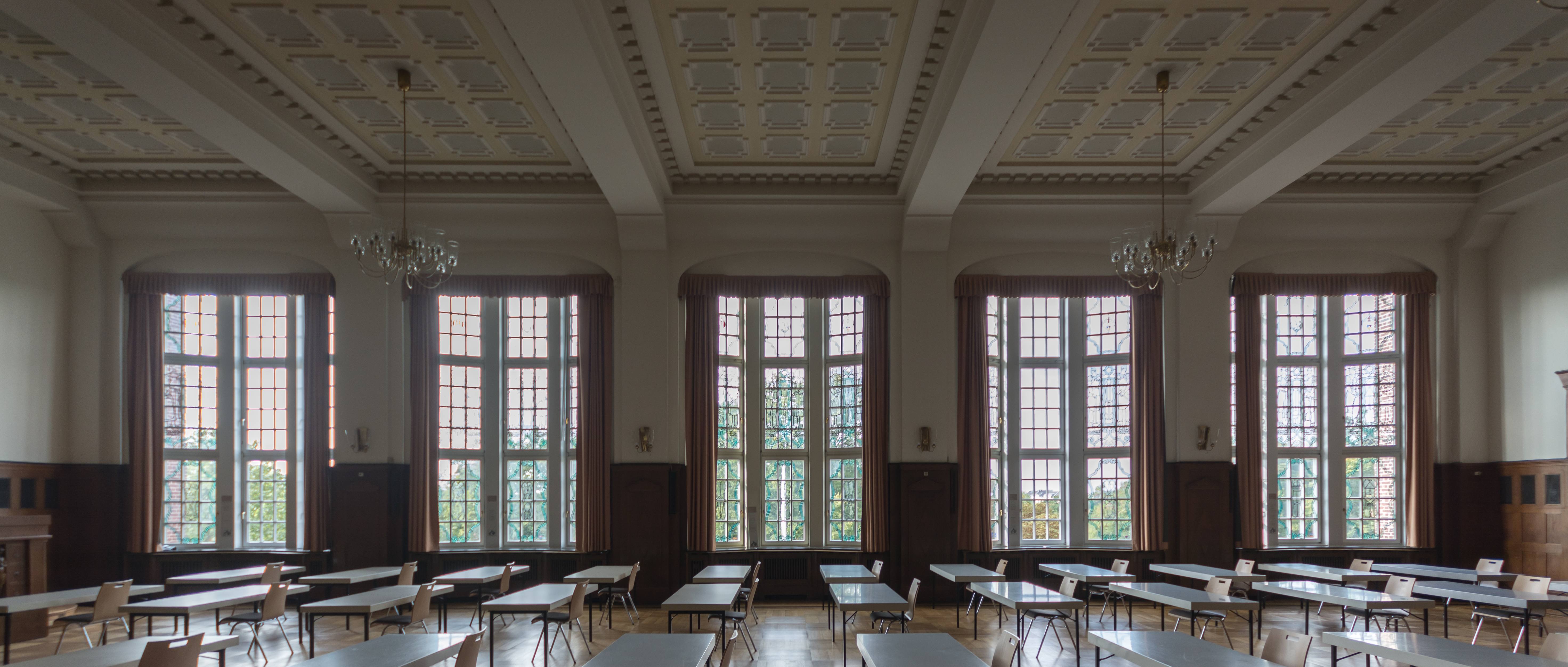 Großer Saal des Gewerbehauses in Hamburg-Neustadt. Stand 2016: d.h. 12 der 15 dreiteiligen Fenster Die Handwerker von C.O.Czeschka waren bereits rekonstruiert. This is a photograph of an architectural monument.